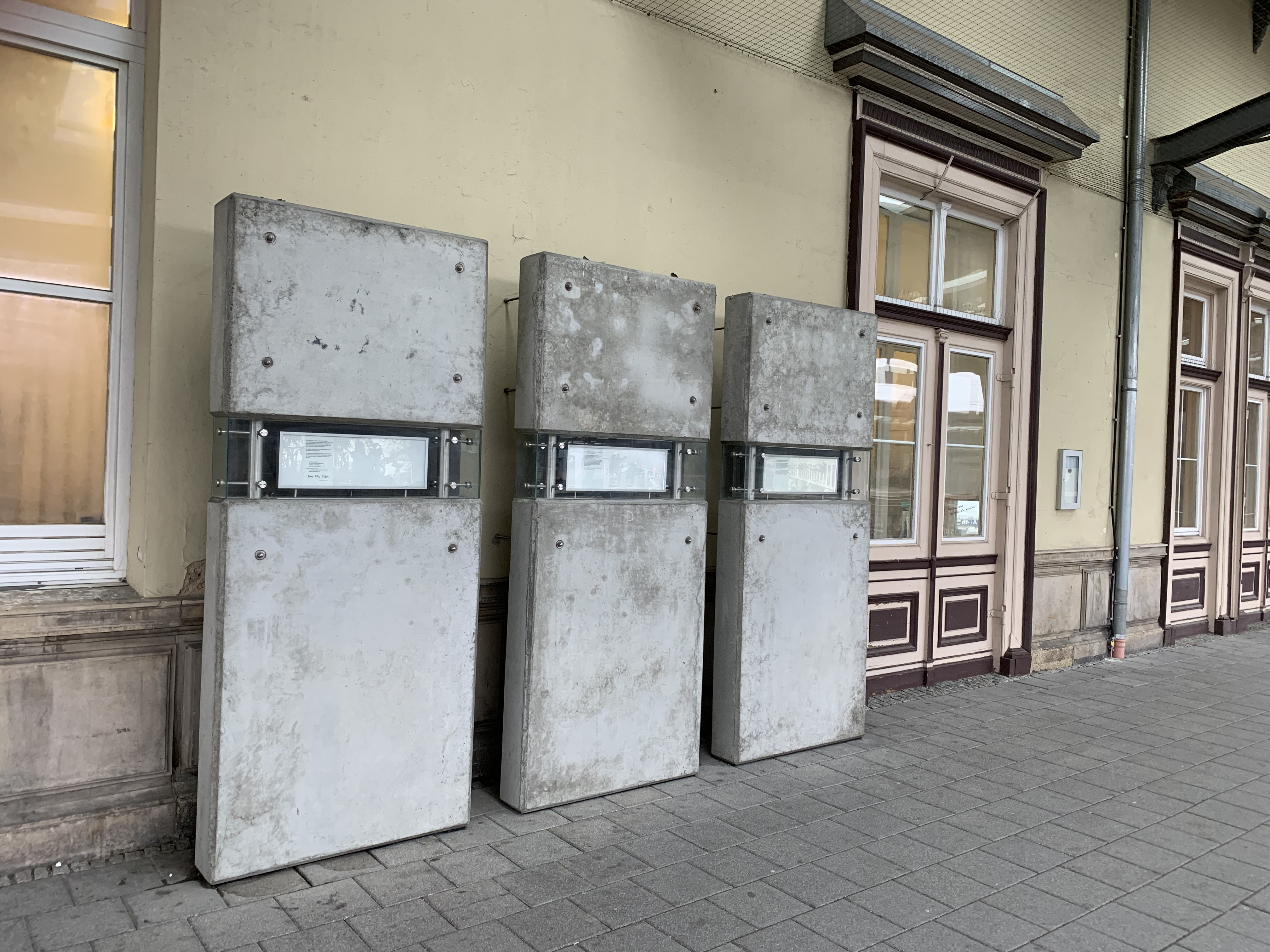 Denkmal an die Prager Botschaftszüge am Hauptbahnhof Hof